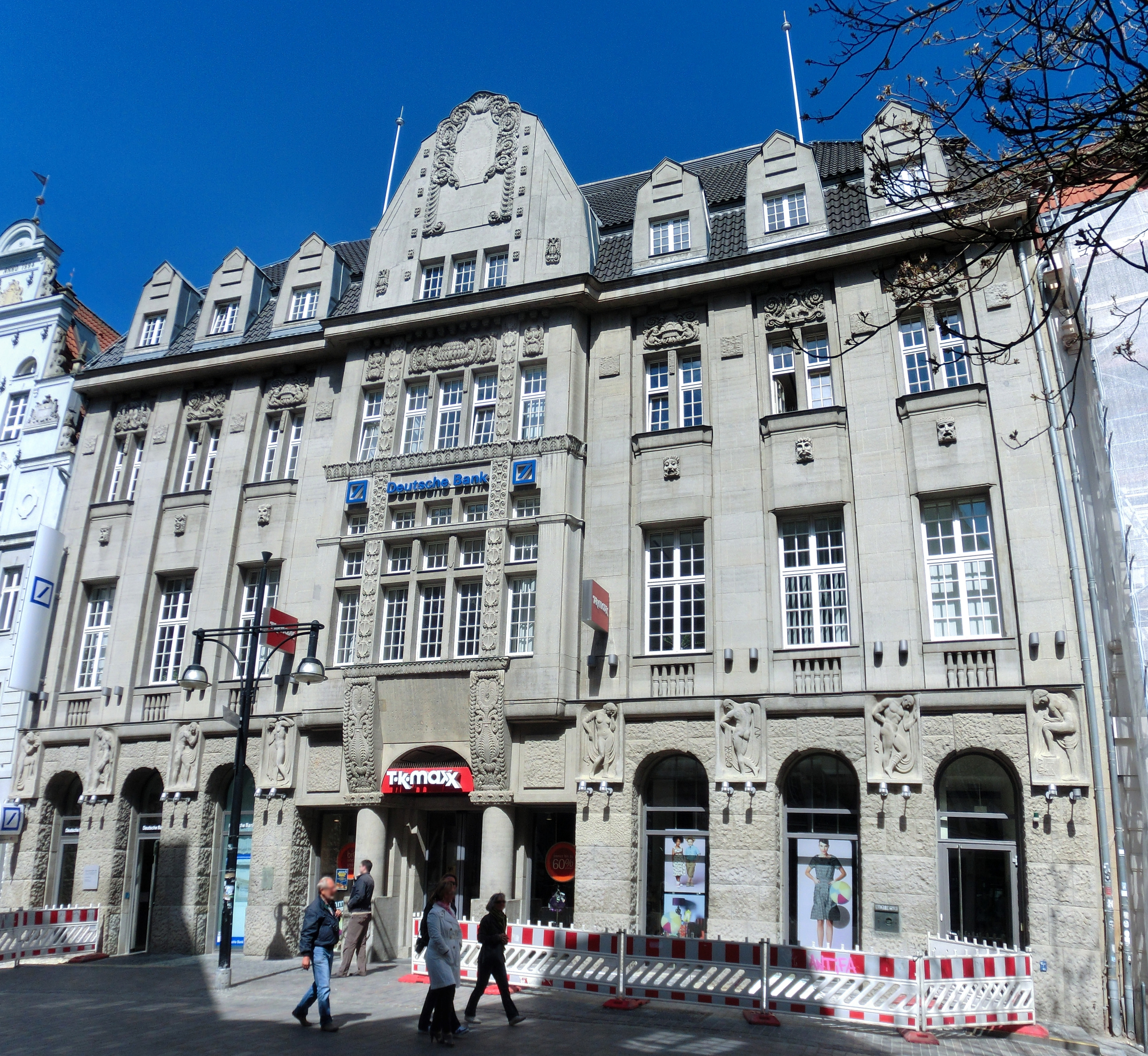 Bankgebäude und Geschäftshaus (Baudenkmal, Rostock, Kröpeliner Straße 84)